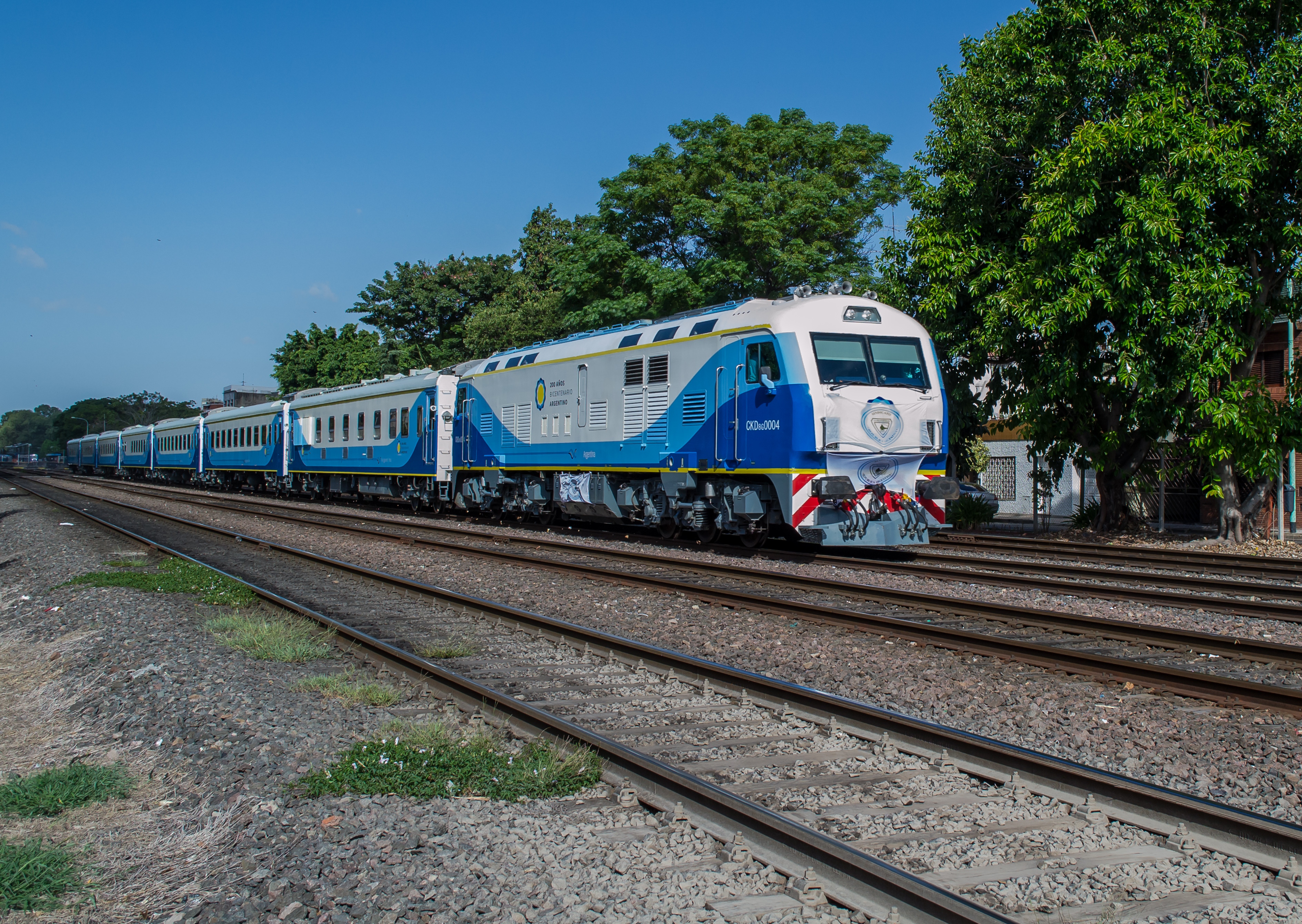 Locomotora CKD 8G 0004 a la cabeza del tren 565 Retiro - Rufino, pasando por Devoto, en su primer servicio comercial.